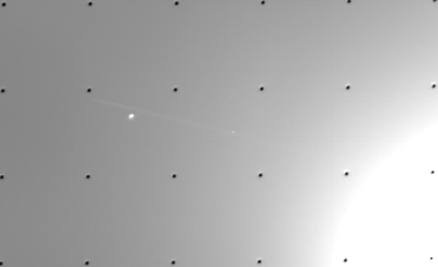 Image de découverte d'Adrastée (FDS 20630.53, saisie 8 juillet 1979 par Voyager 2). Adrastée est la petite tache claire au milieu, dans le plan des anneaux joviens.